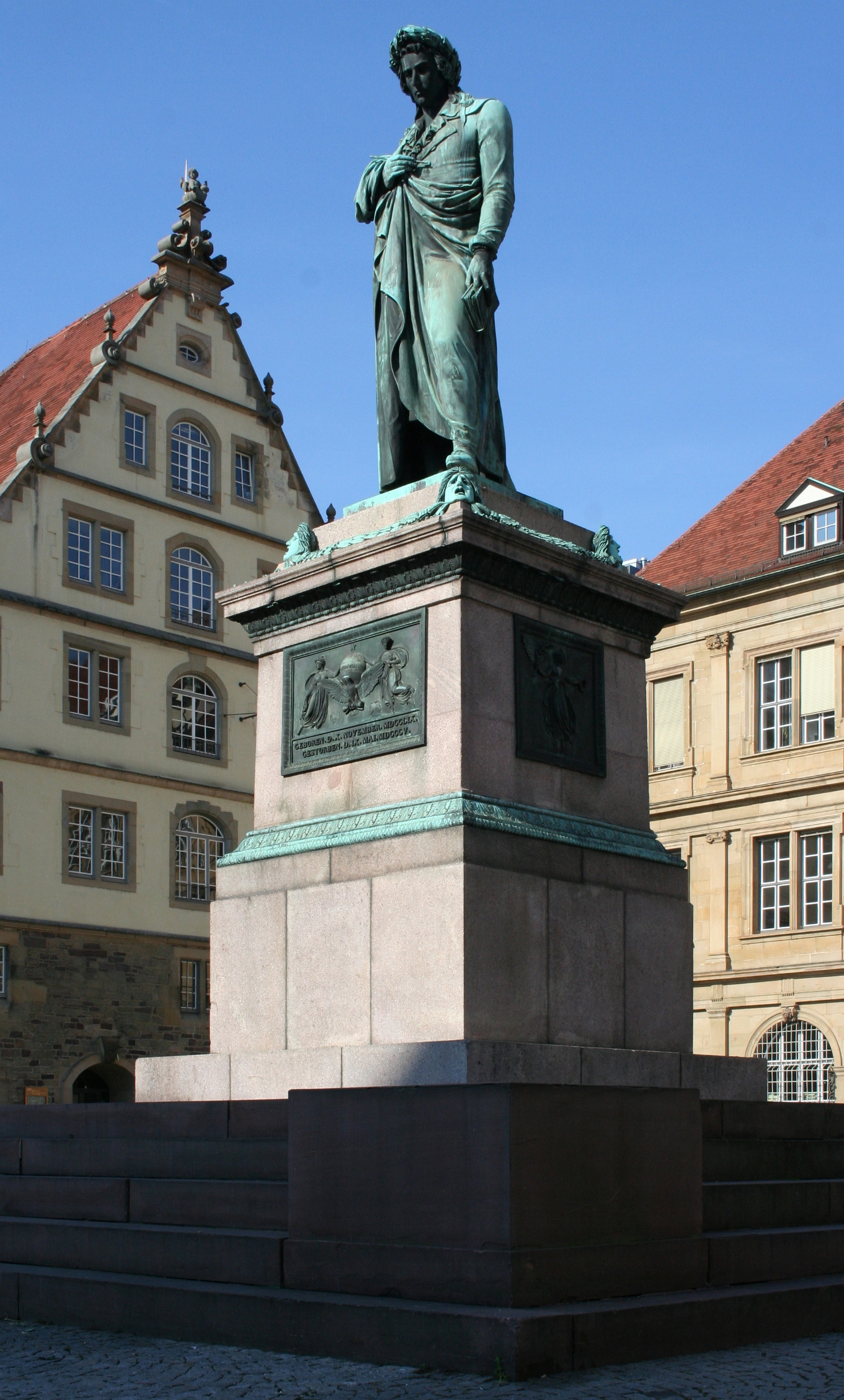 Schillerdenkmal am Schillerplatz (Stuttgart)